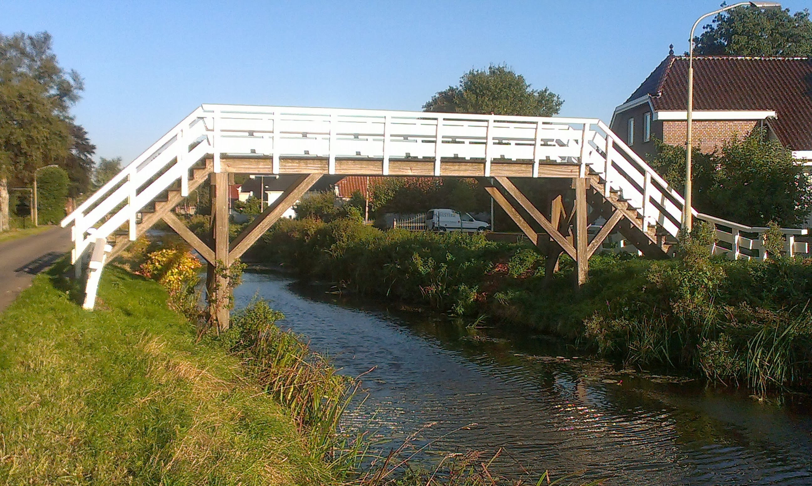 Een hoogholtje is in de provincie Groningen de benaming voor een hoge vaste voetbrug, hoog genoeg om schepen te laten passeren.